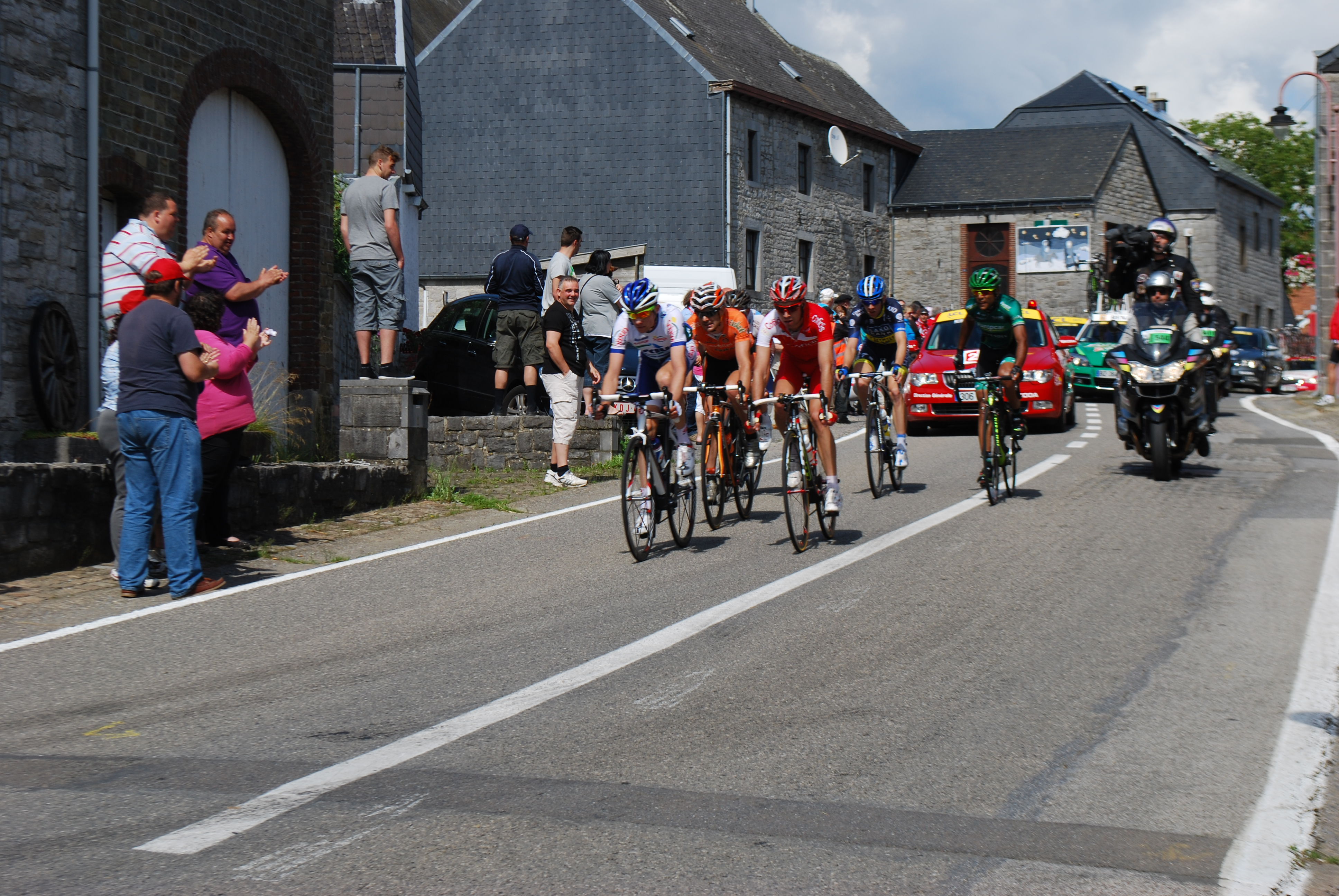 Vue du passage du Tour de France 2012 à Tohogne (Durbuy).